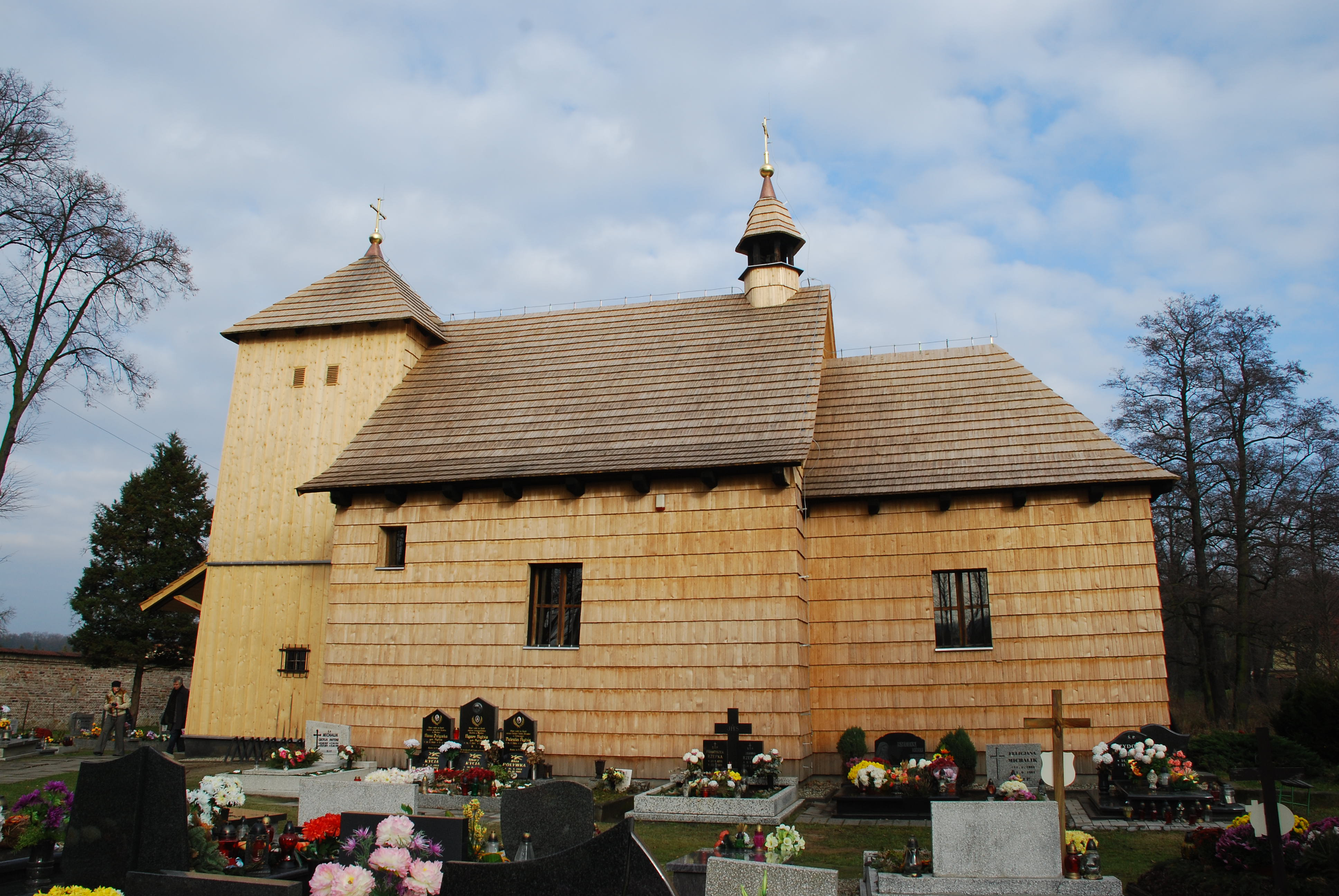 Szałsza - kościół filialny pw. Narodzenia NMP (zabytek nr A/282/60)